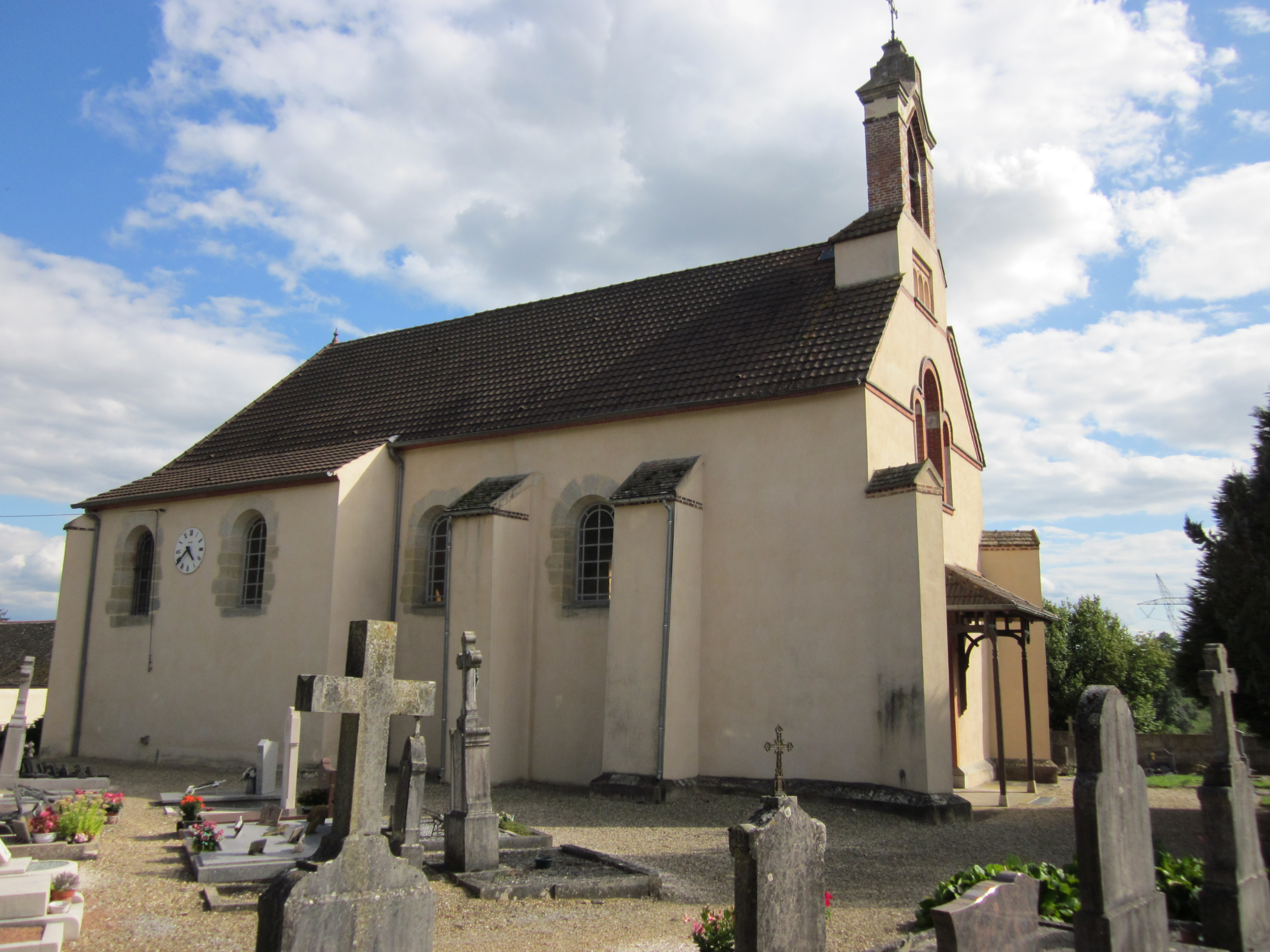 église de Palleau - Saône et Loire